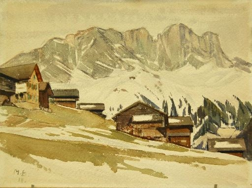 Schuders (bei Schiers), Aquarell